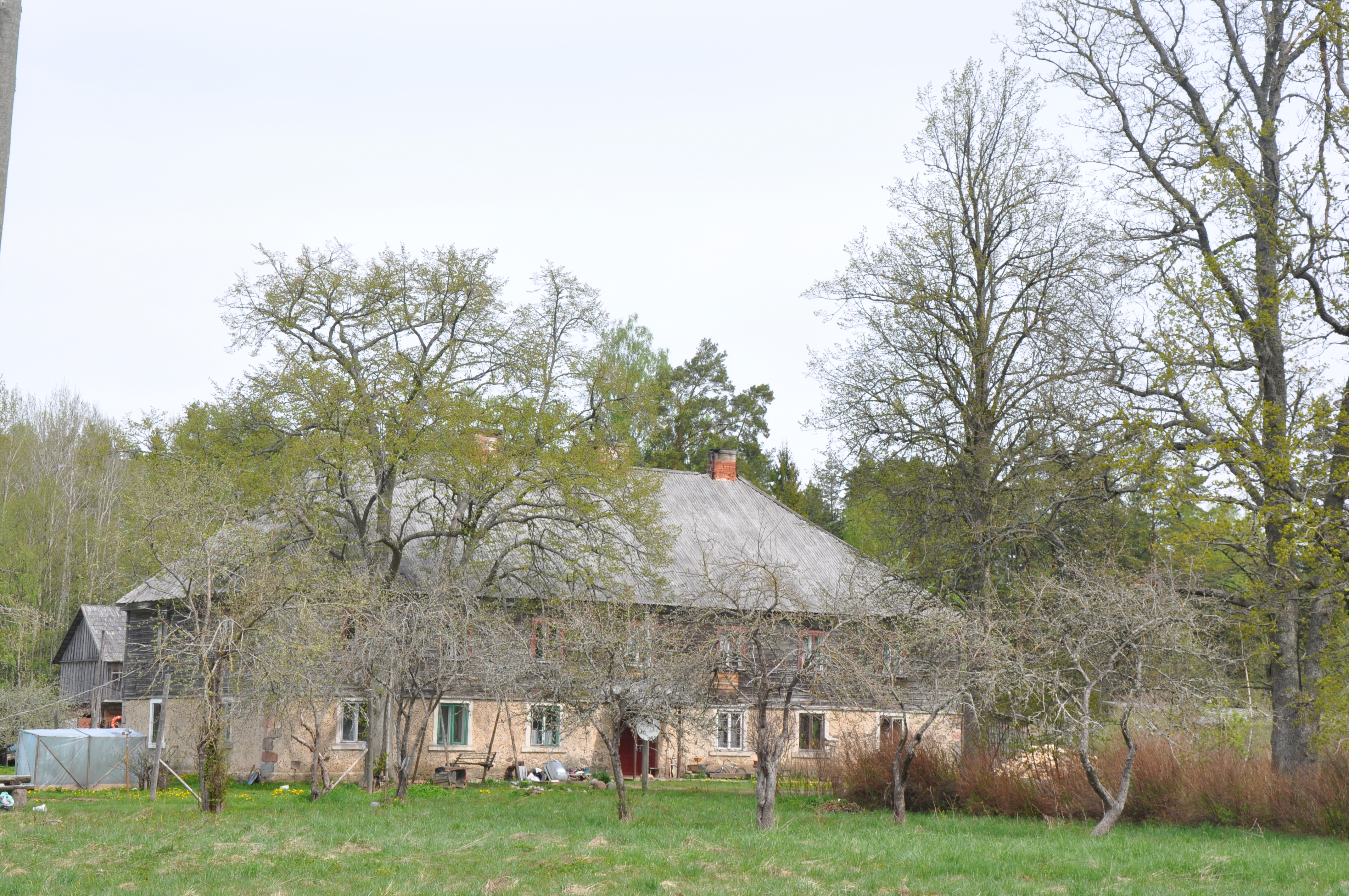 Kādreizējā Ģipkas skola, Rojas pagasts, Rojas novads, Latvia